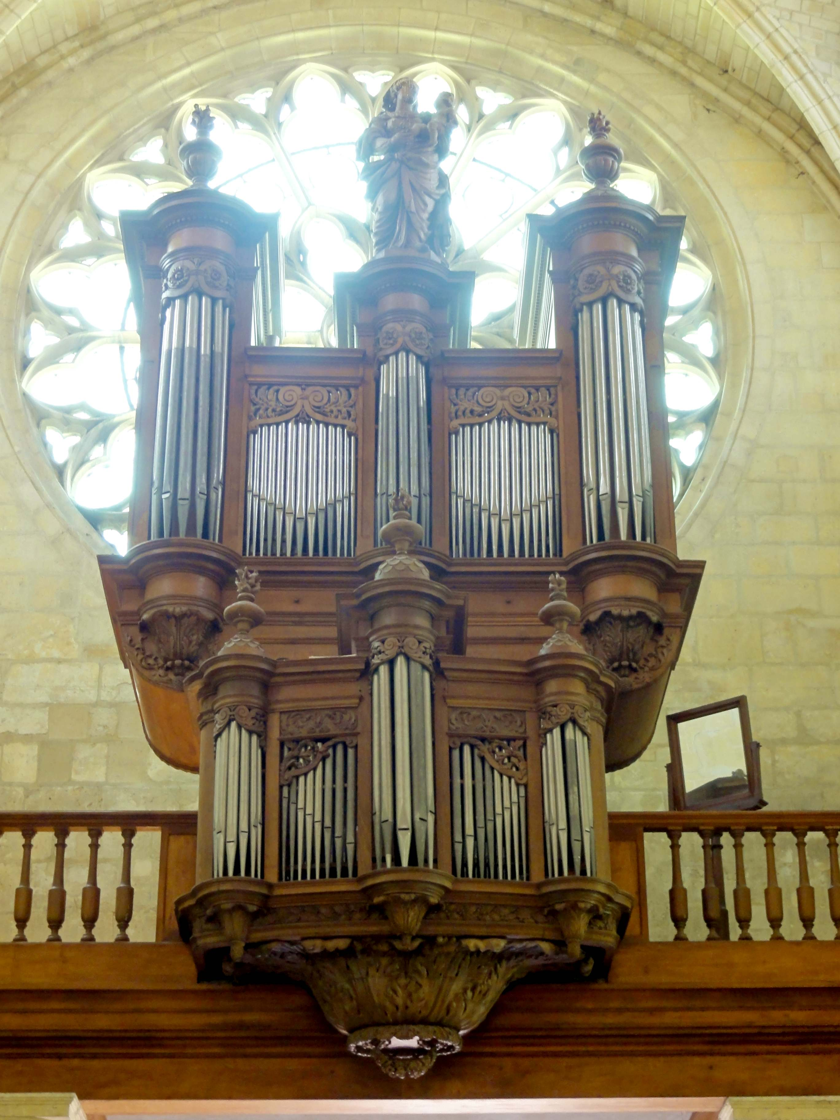 Chambly (Oise, France), église Notre-Dame, orgue de tribune construit en 1679 par Jacques Carouge pour le couvent de La Présentation à Senlis, transféré à Chambly pendant la Révolution, restauré en 1986 par Théo Haerpfer, buffet et partie instrumentale classés M.H..